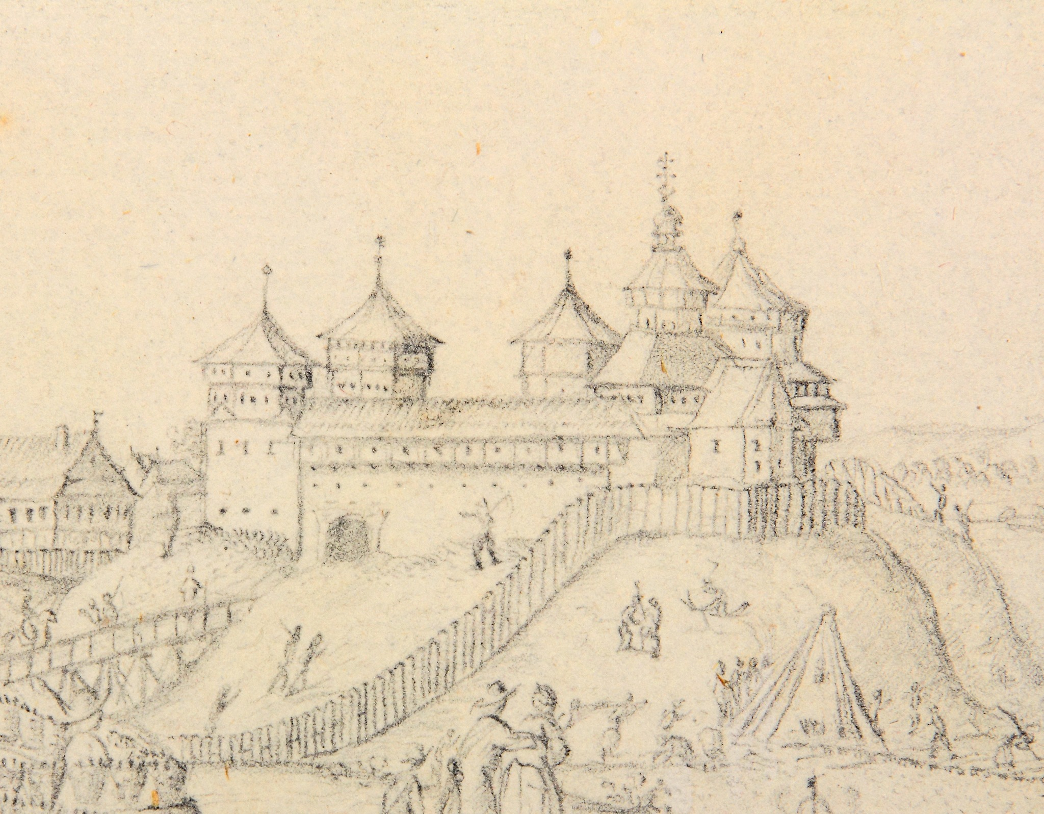 Беларуская (тарашкевіца): Рэчыца (Rečyca), замак